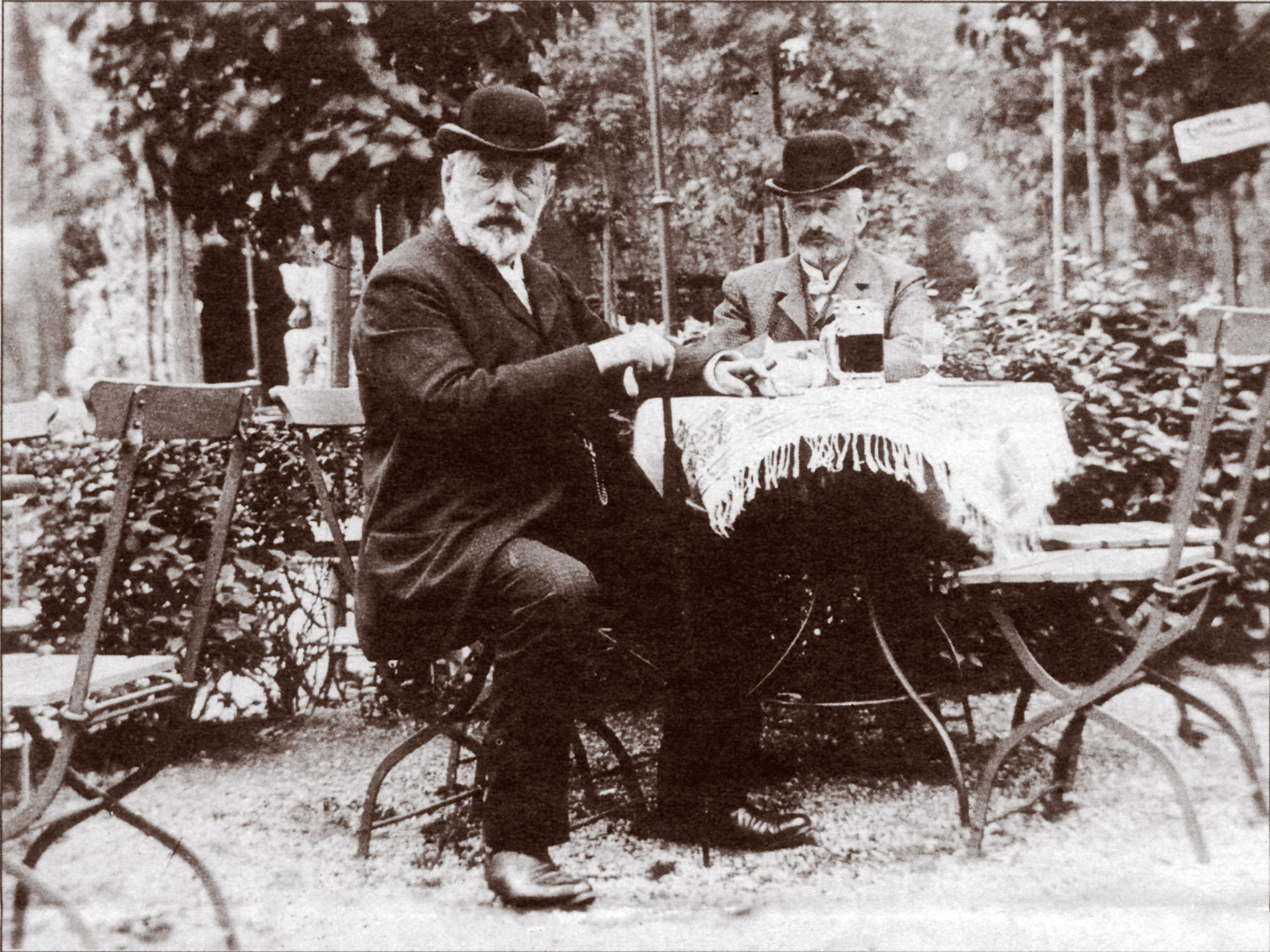 Ernst Pinkert (1844–1909) in seinem Pfaffendorfer Hof. Die Person im Hintergrund ist unbekannt.